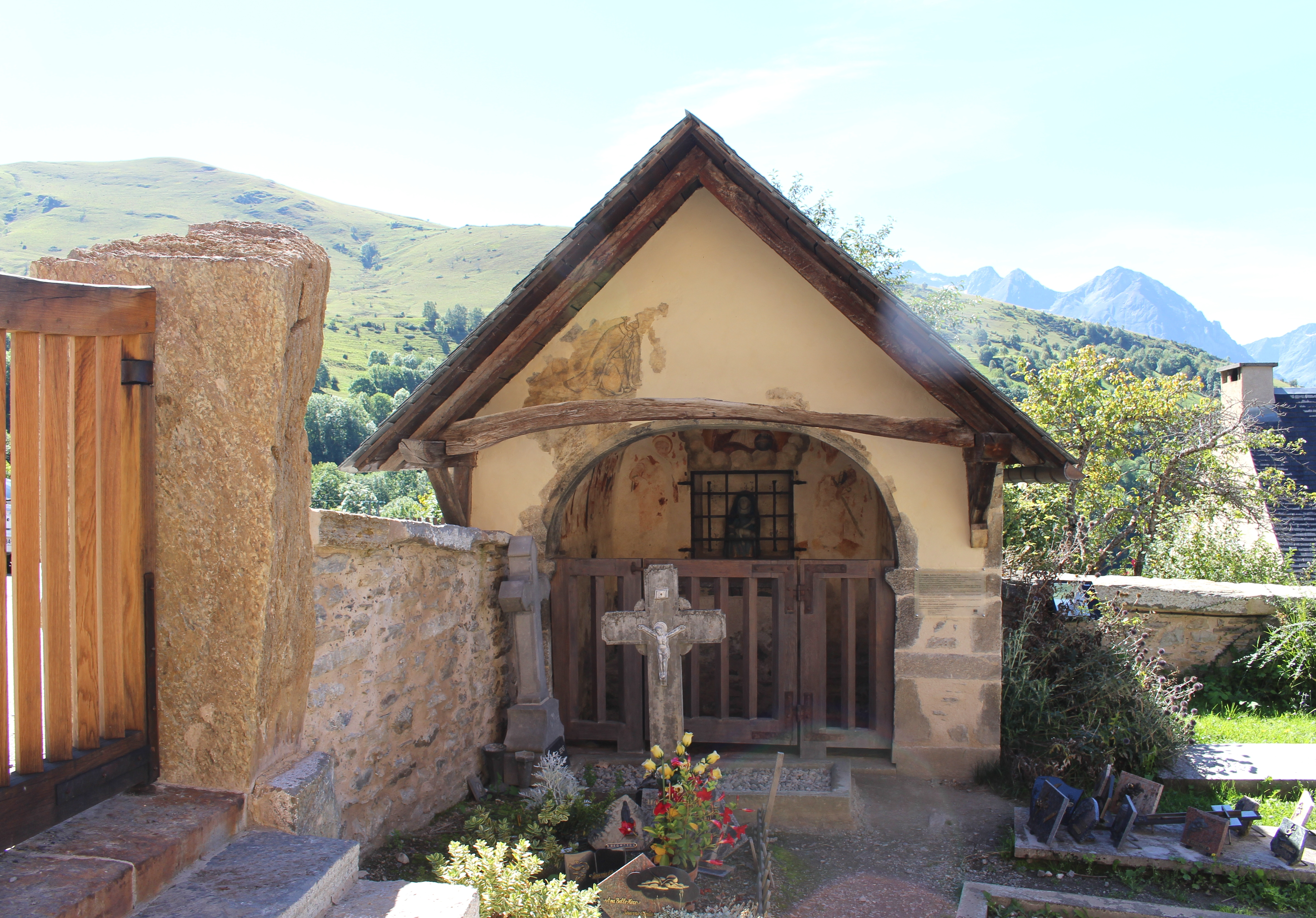 Oratoire Sainte-Catherine de Mont (Hautes-Pyrénées)